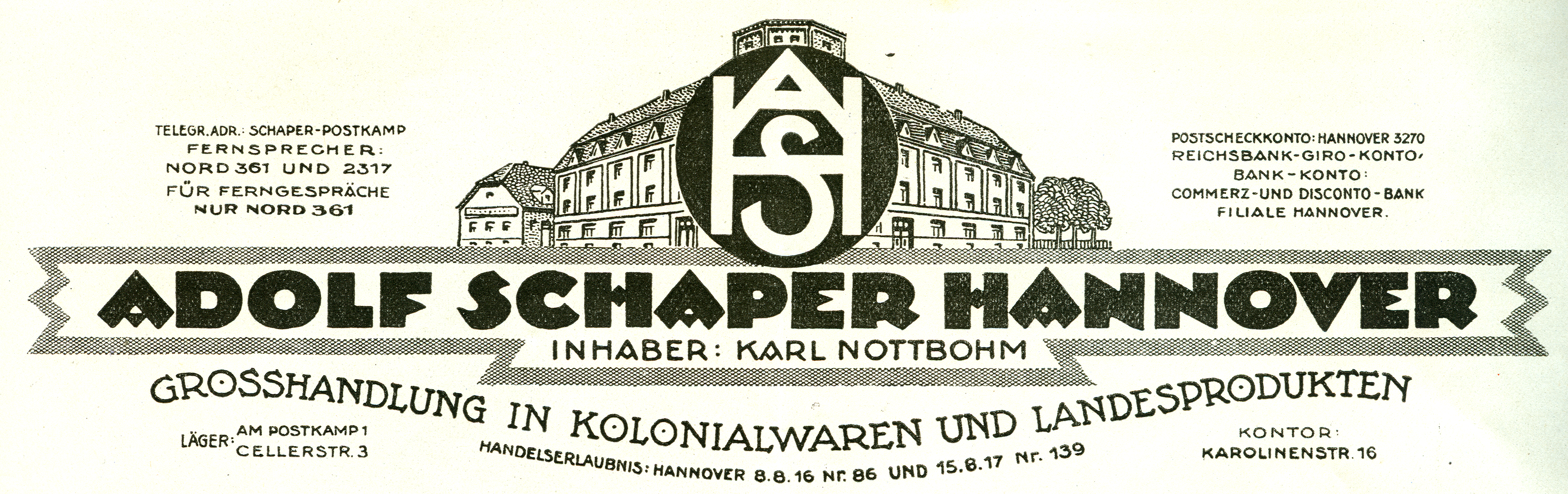 Adolf Schaper in Hannover, Inhaber Karl Nottbohm", betrieb laut Handelserlaubnis von 1916 und 1917 eine "Großhandlung in Kolonialwaren und Landesprodukten". Standort der Läger war Am Postkamp 1 sowie Celler Straße 1, während das Kontorhaus sich in der Karolinenstraße 16 befand.